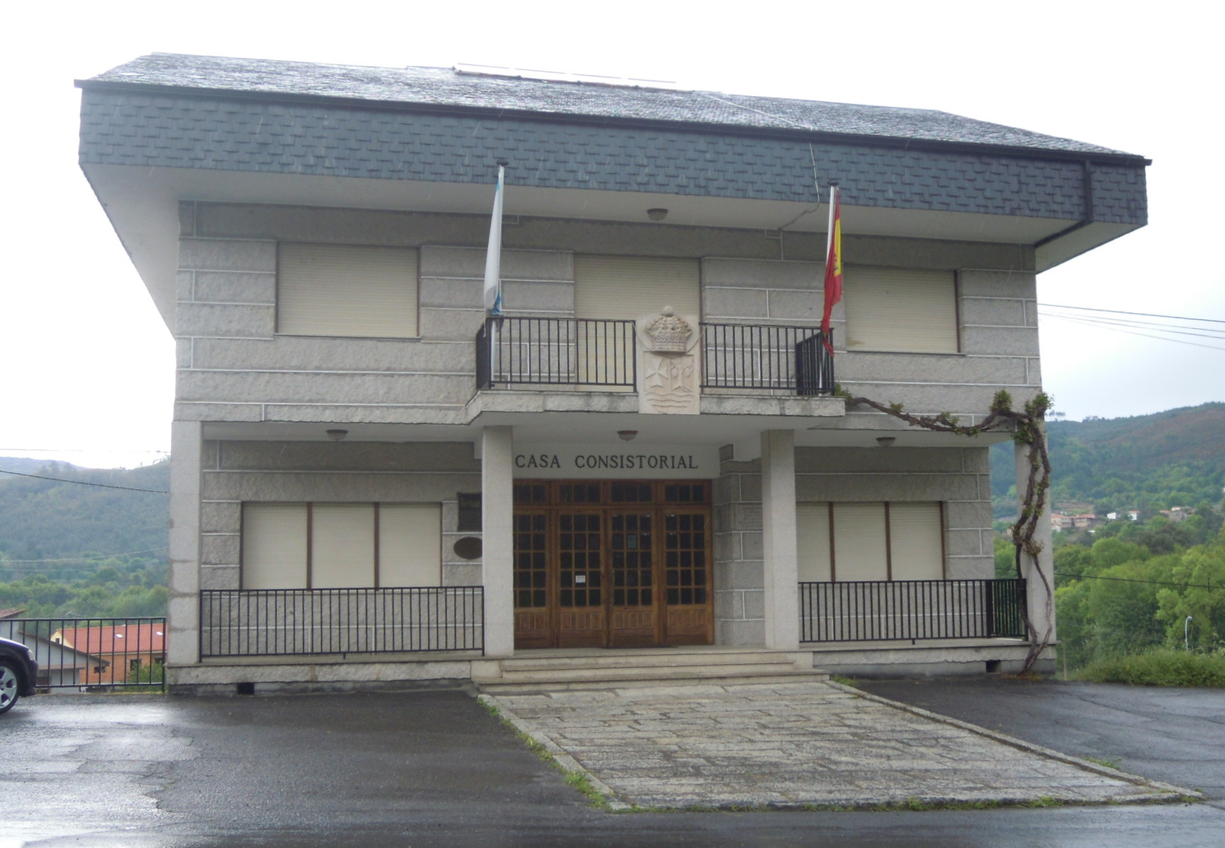 Casa consistorial de Beade